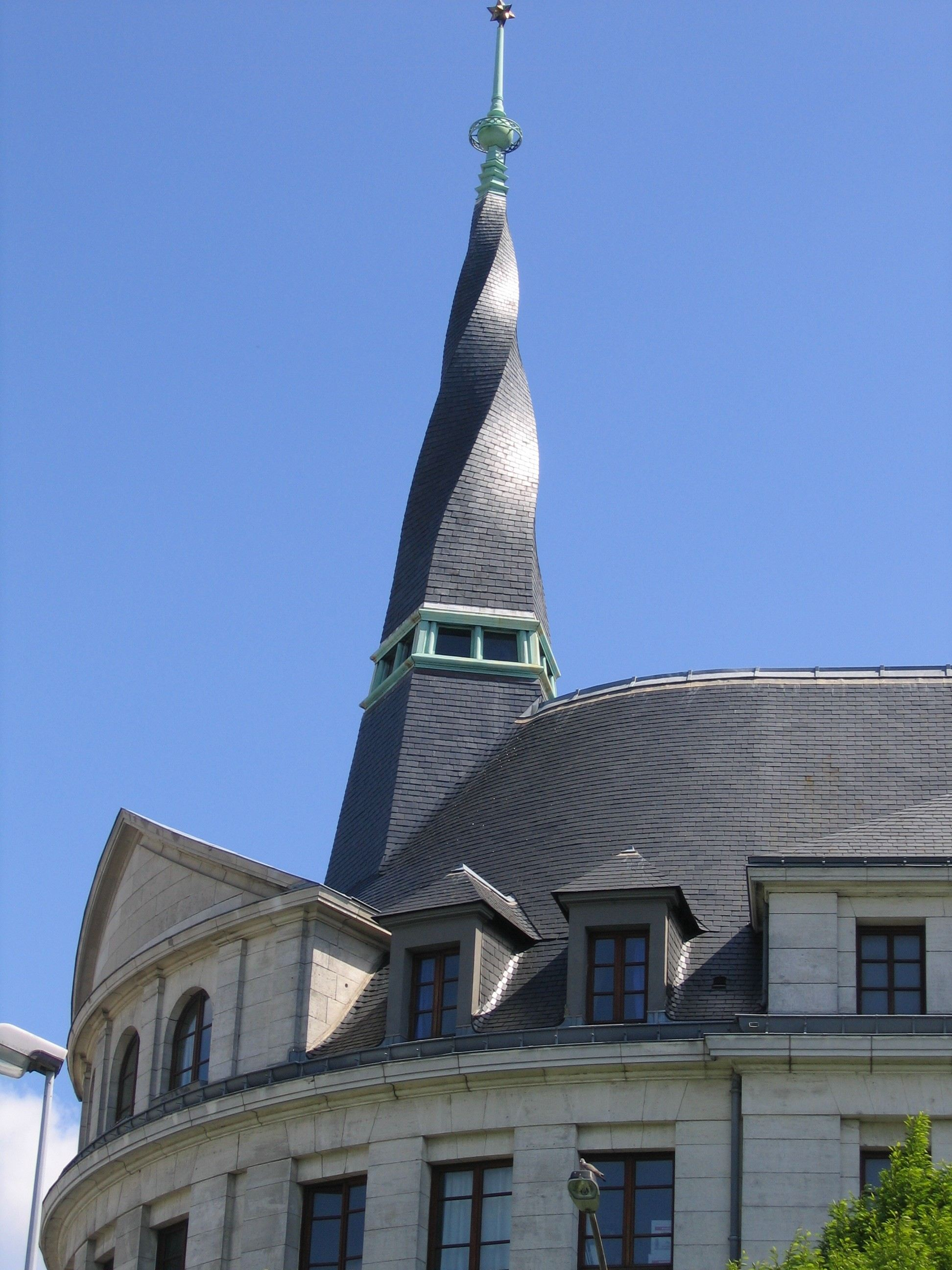 Photographie du clocher de la "maison des compagnons du tour de France" à Nantes